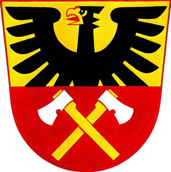 Znak obce Nová Dědina (okres Kroměříž)